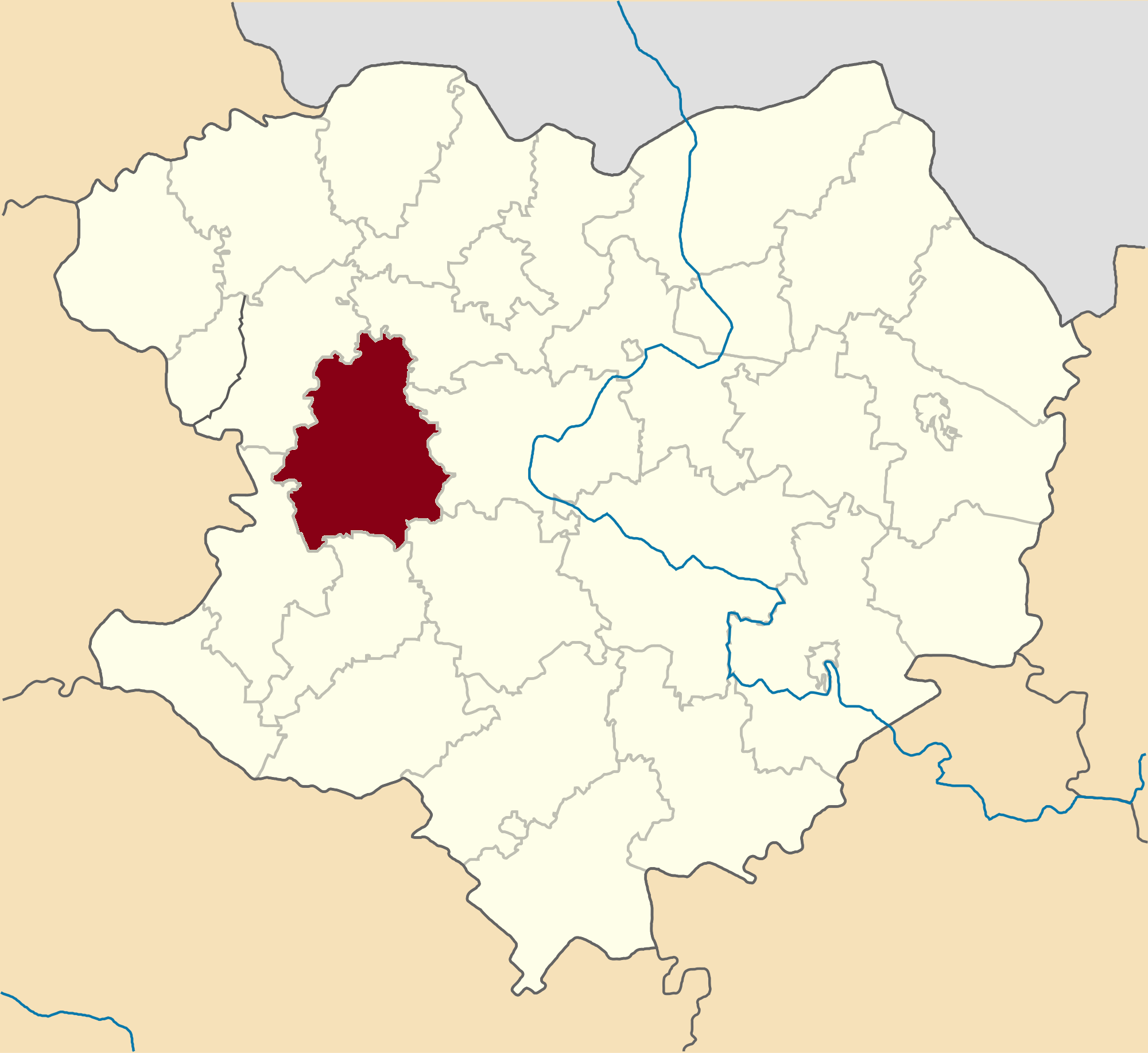 Novovodolazkyi-Raion map